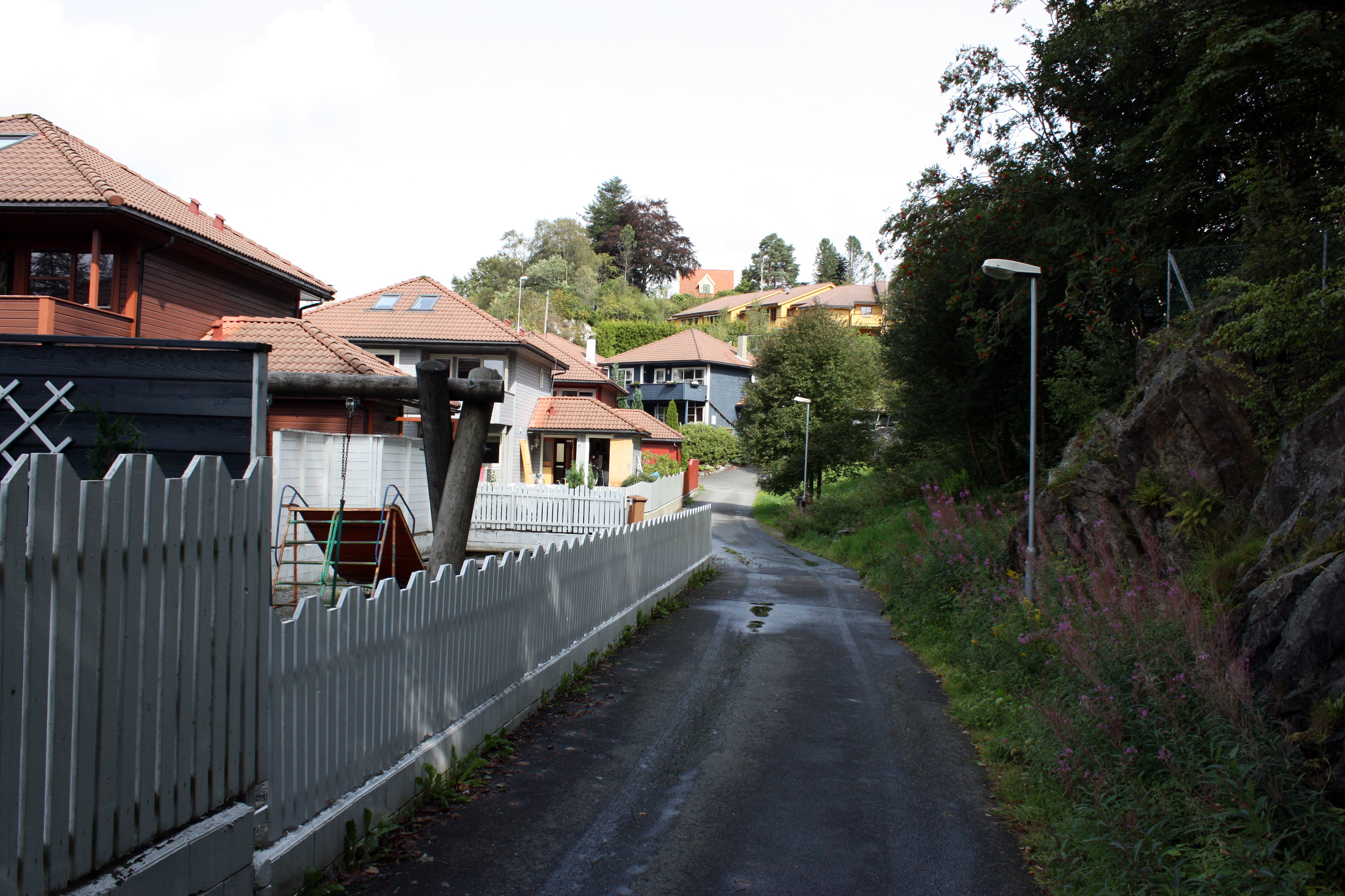 Smøråshagen, Fana, Bergen. August 2009.